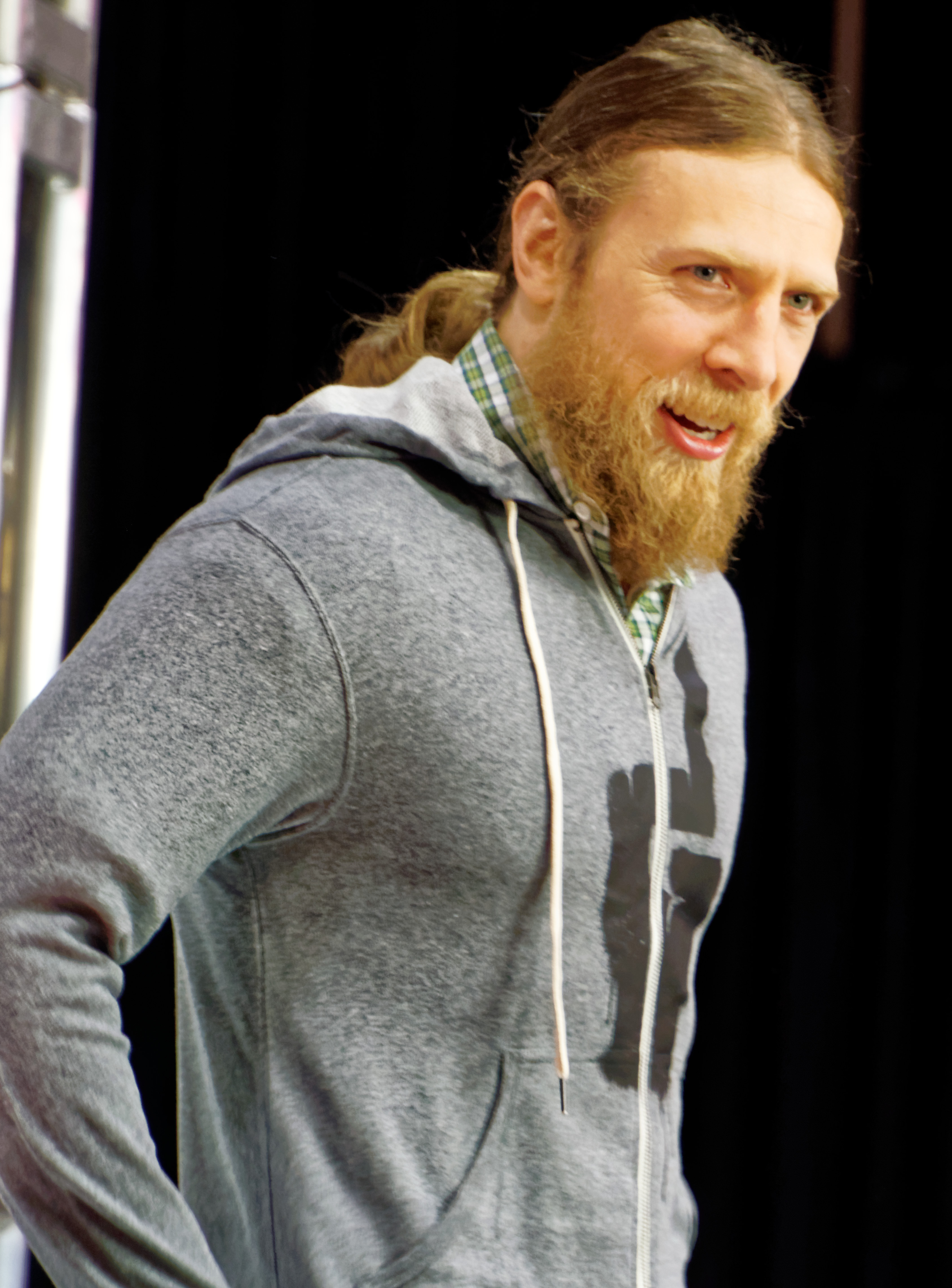 2015-03-28_08-22-46_ILCE-6000_4229_DxO